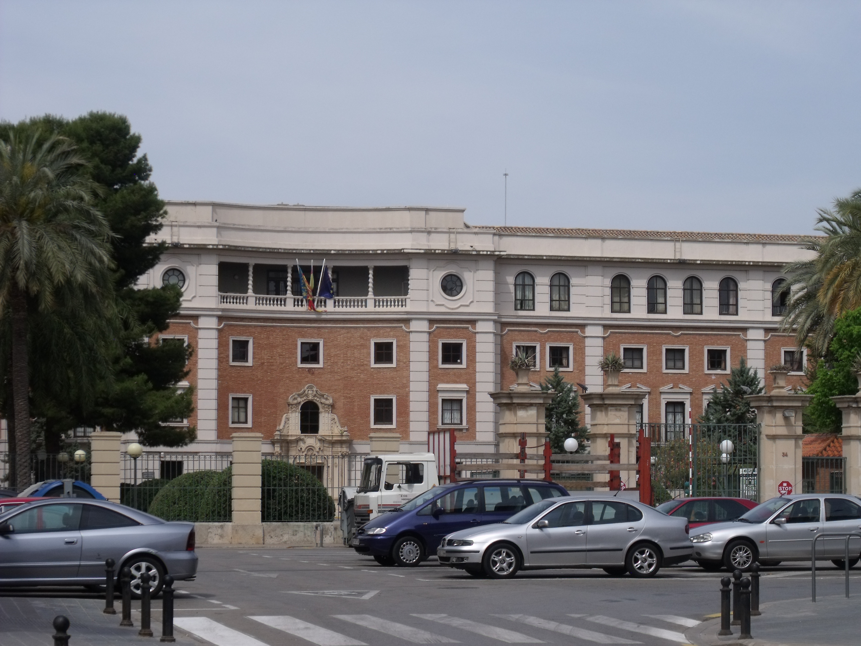 Fachada principal